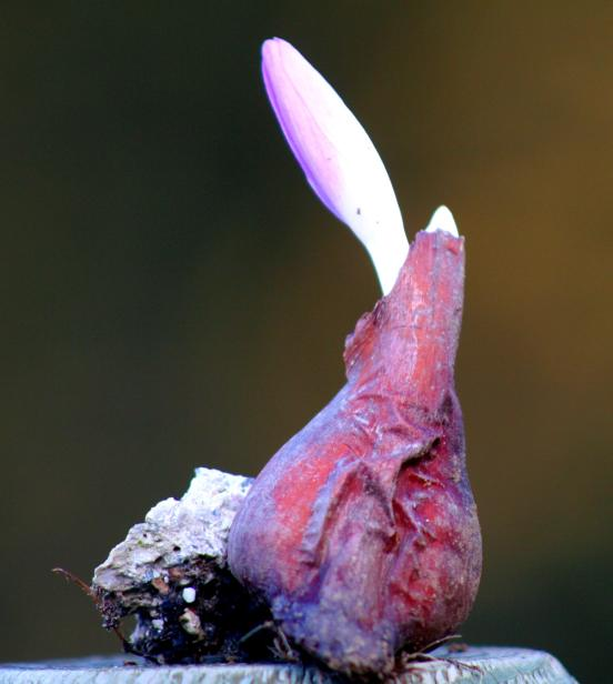 Colchico d'autunno